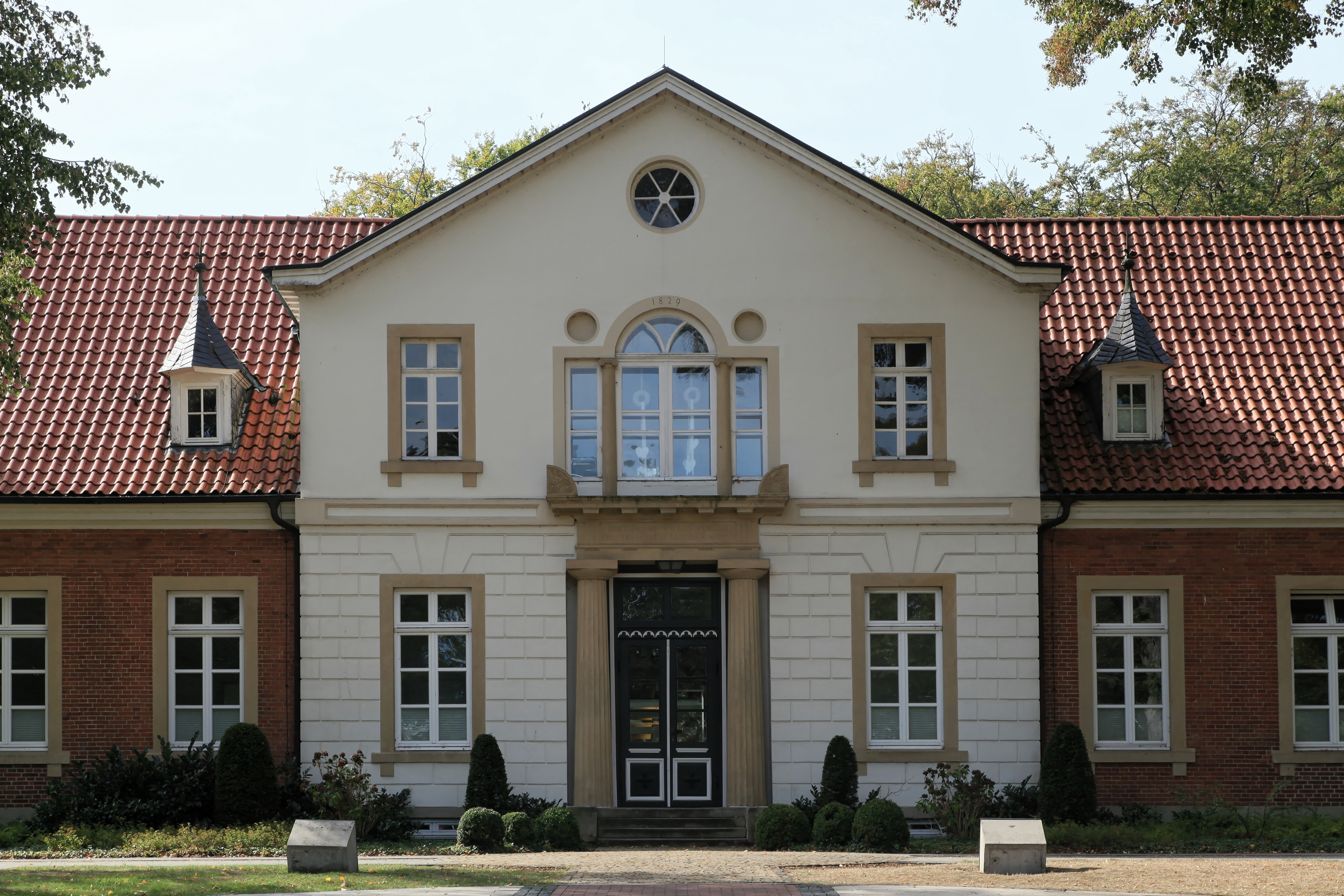 Gebäude Ludmillenhof, Bahnhofstraße/Berßener Straße in Sögel